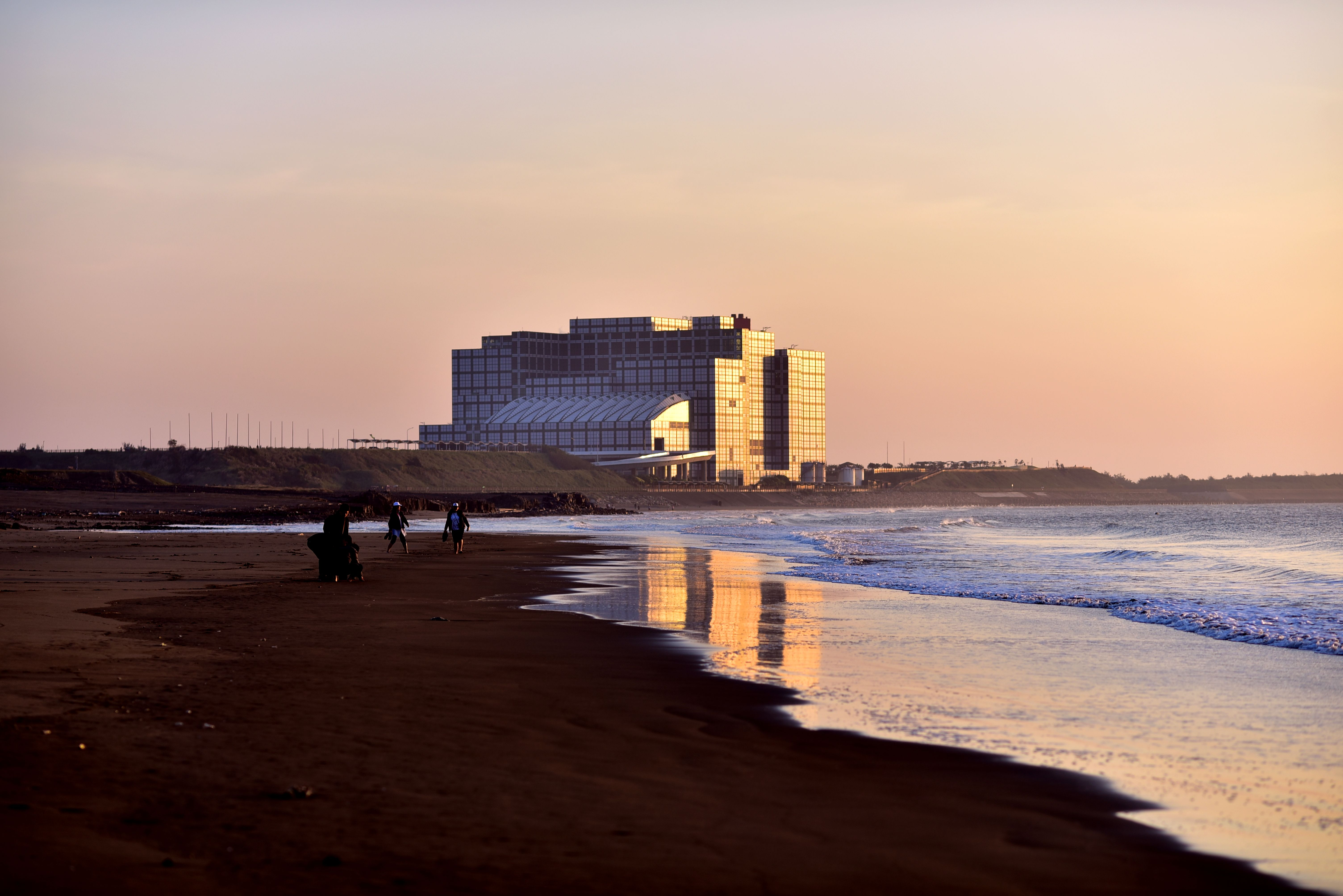 2017Hsinchu Refuse Resource Recovery Plant 垃圾焚化廠&看海公園